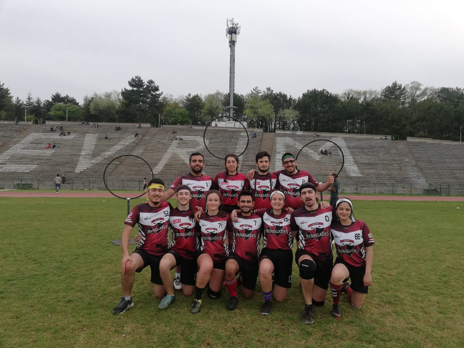 Boğaziçi Üniversitesi Quidditch Takımı